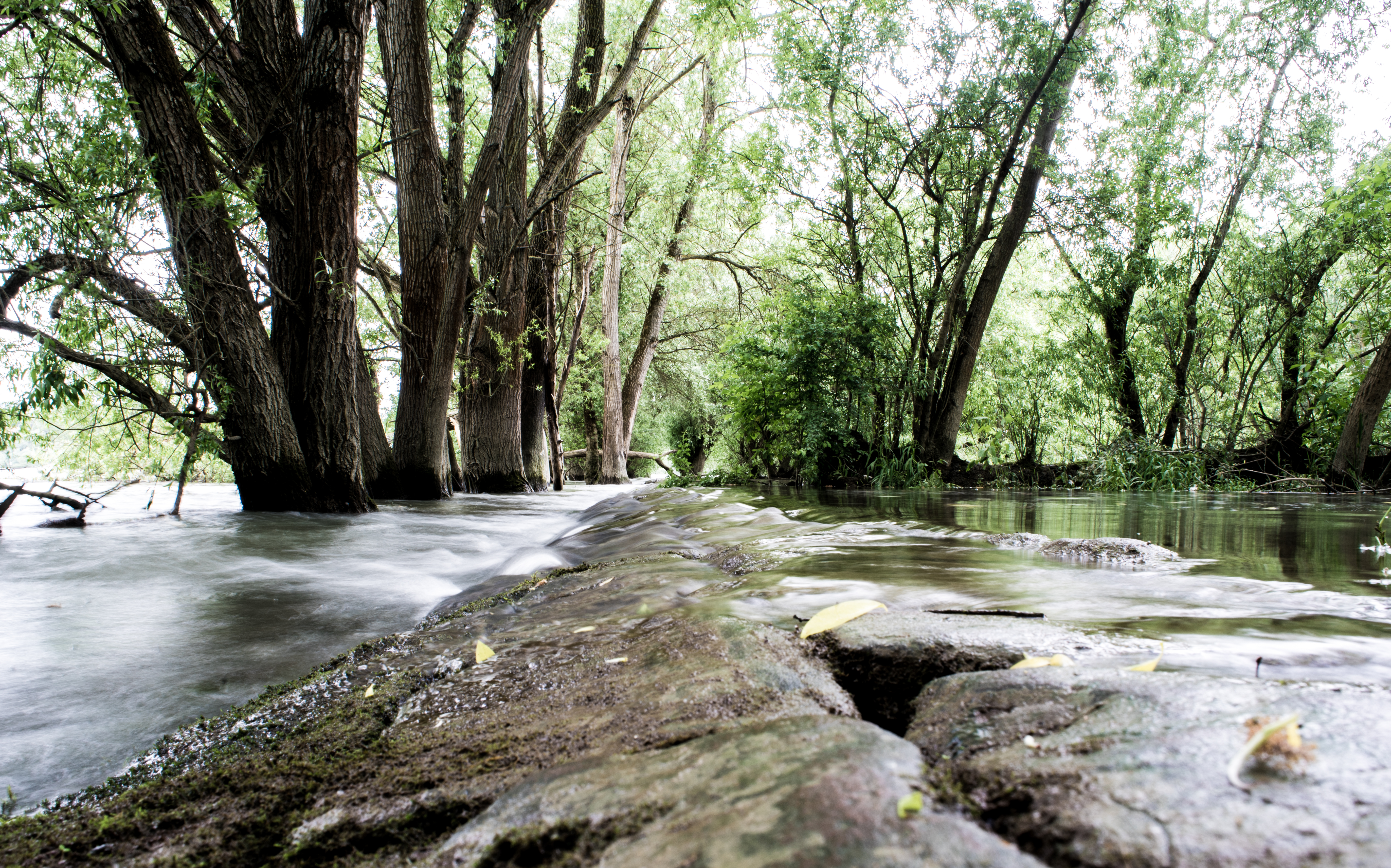 Naturschutzgebiet „Haderaue-Königsklinger Aue“ (NSG 339177) in Rheinland-Pfalz